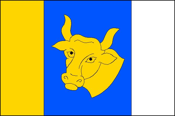 Vlajka obce Býkov-Láryšov